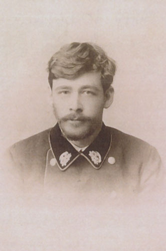 Пётр Юльевич Зубов (1871—1942) — студент Ново-Александрийиского сельско-хозяйственного института, в будущем земский начальник, товарищ головы города Вологды (1918), член Временного правительства Северной области (1918—1920), актёр провинциальных театров.